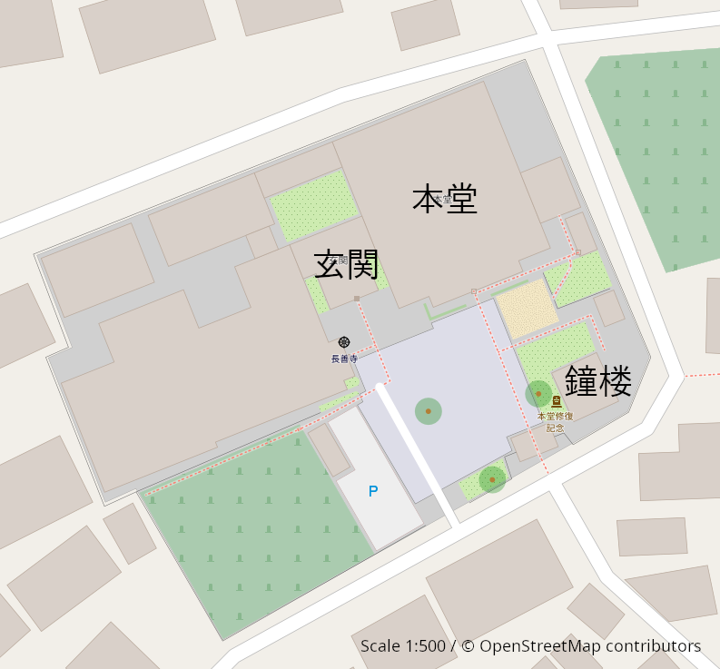 長善寺の境内図（2019年2月9日時点）